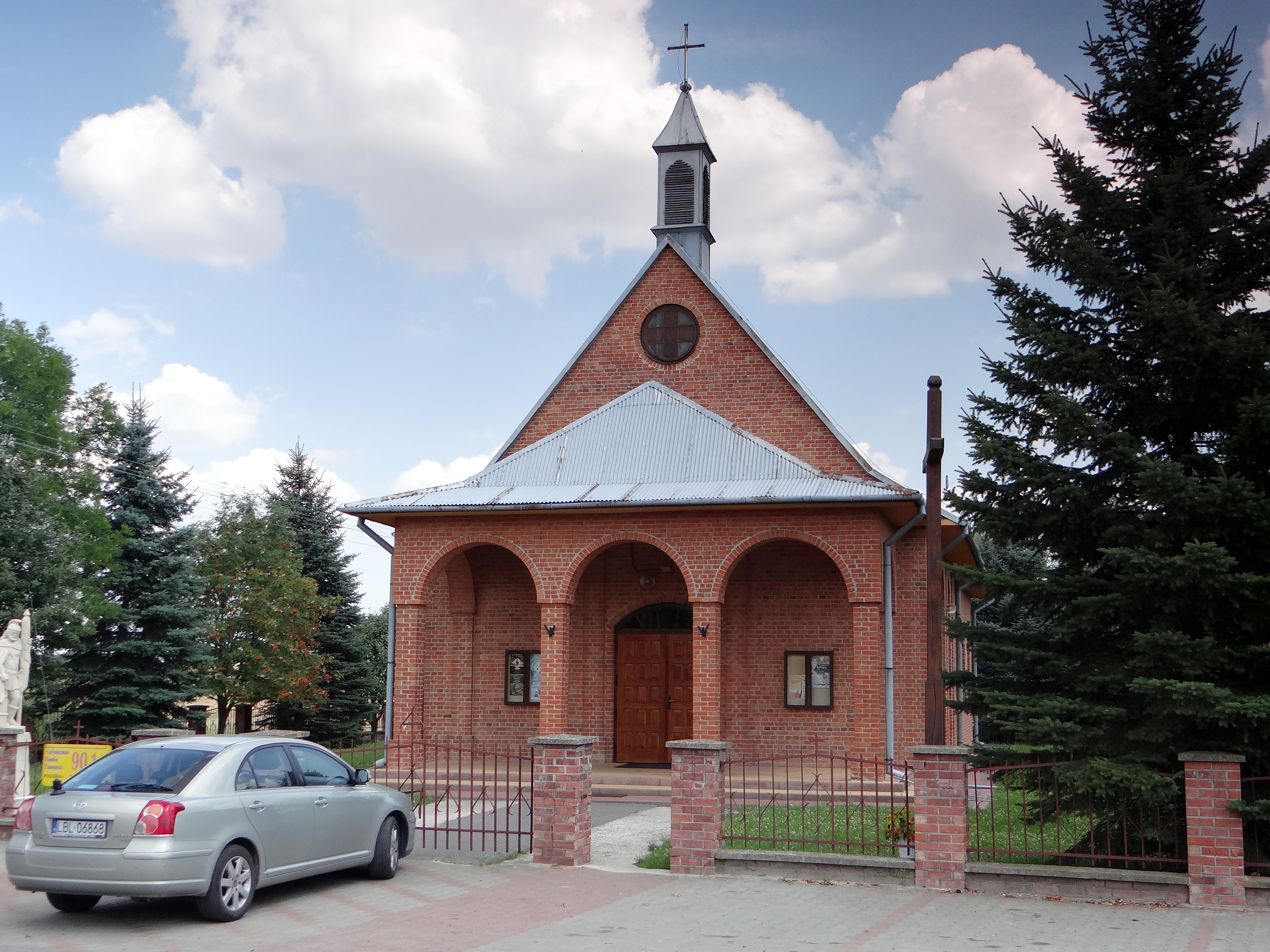 Kostel v obci Telatyn, Polsko